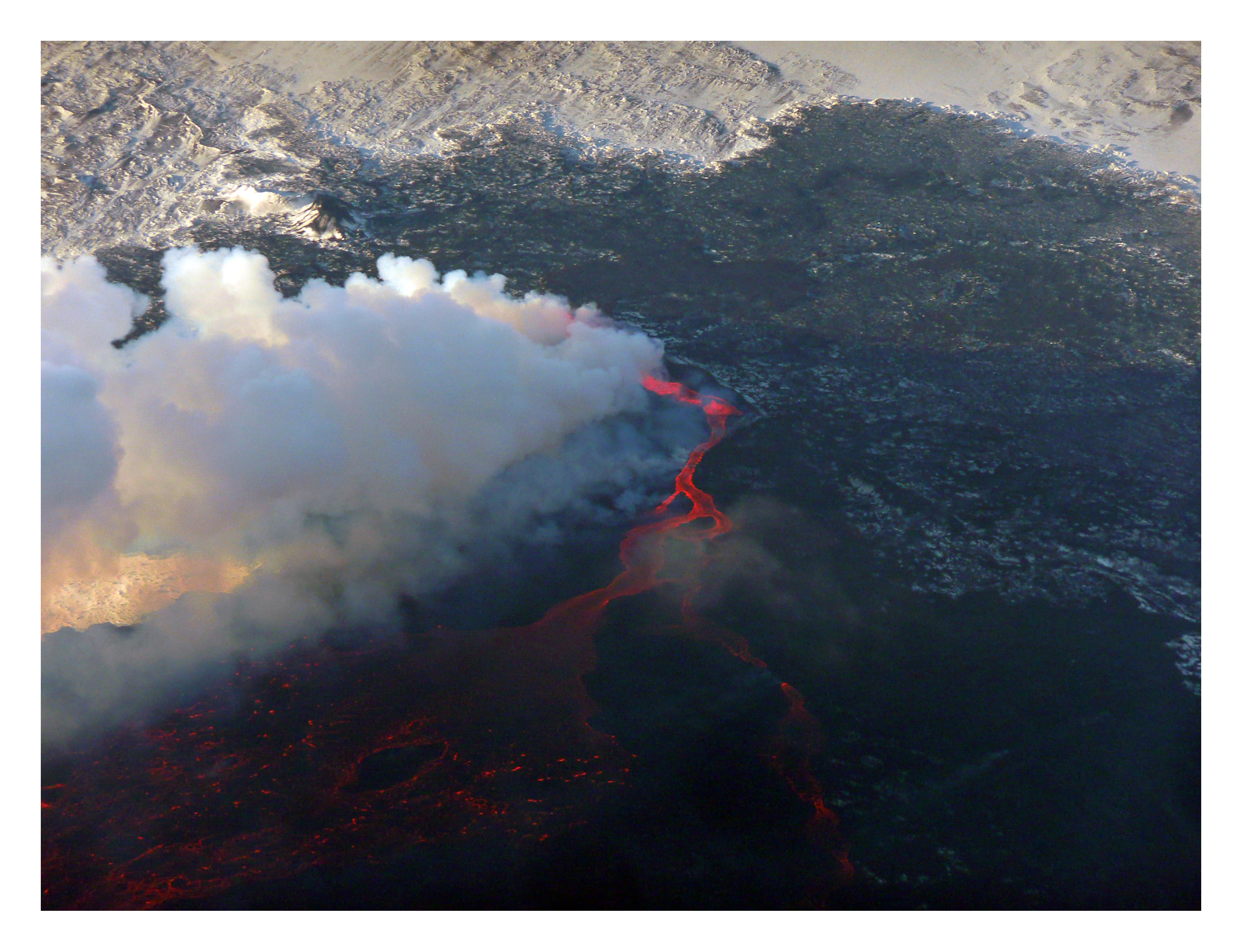 Bárðarbunga IV - Holuhraun